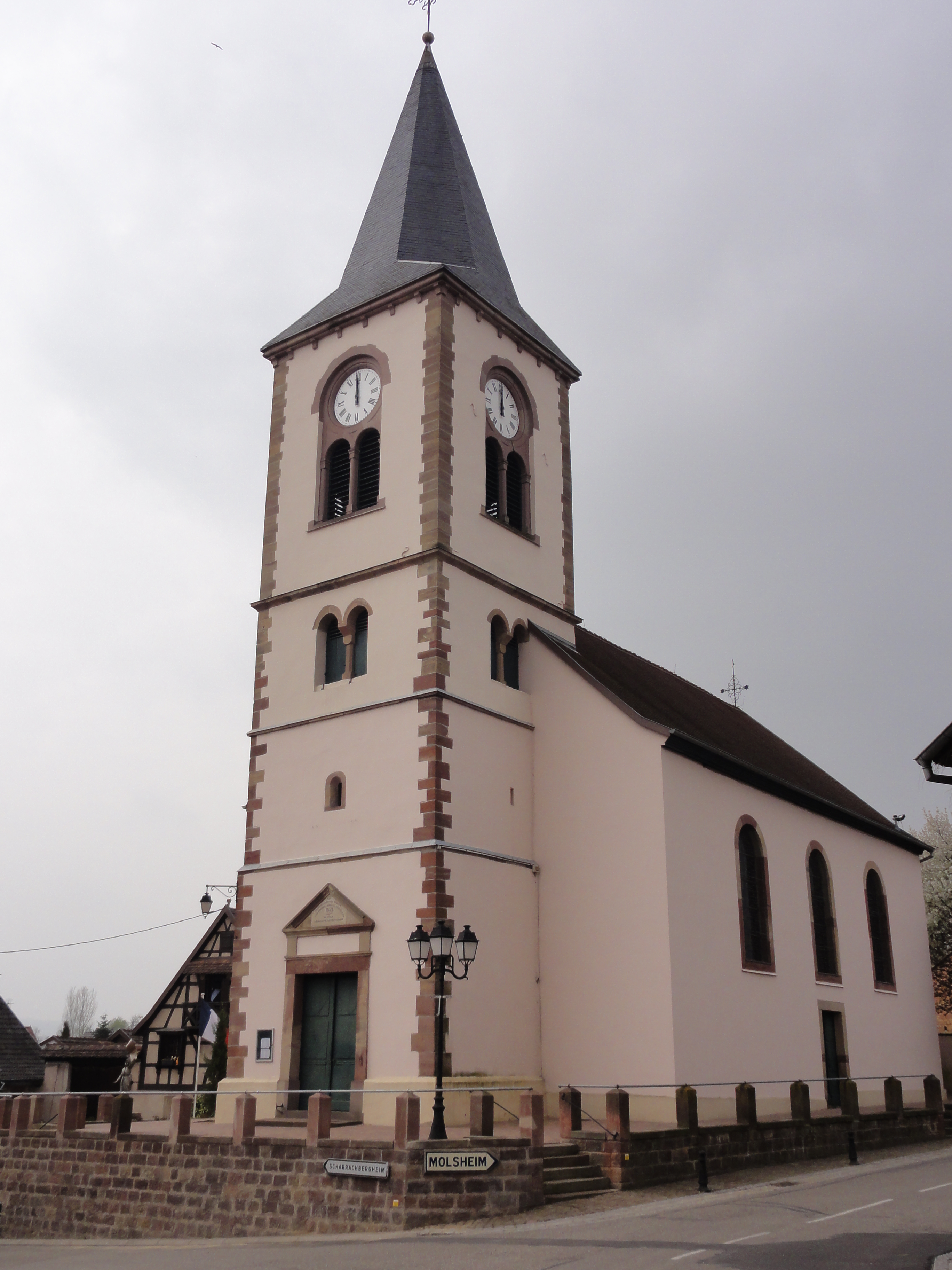 Alsace, Bas-Rhin, Odratzheim, Église Sainte-Marguerite (1852)